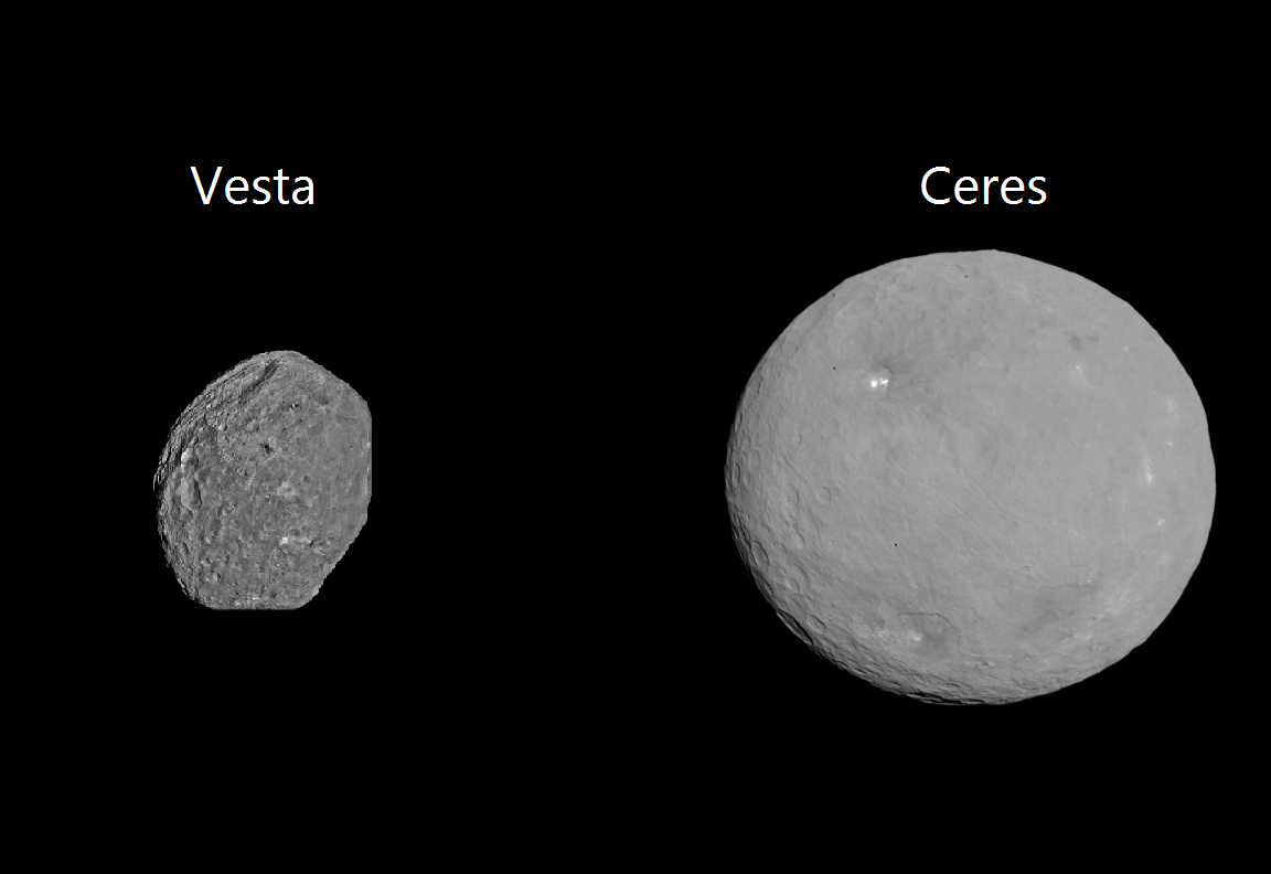 Сравнение Весты и Цереры